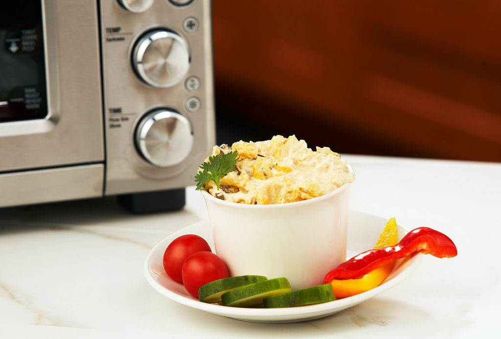 Baked crab dip